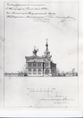 Лист проекта храма во имя Преображения Господня в Лесном (Санкт-Петербург, ул. Орбели 25), западный фасад, автор проекта: Пруссаков, Василий Агатонович.